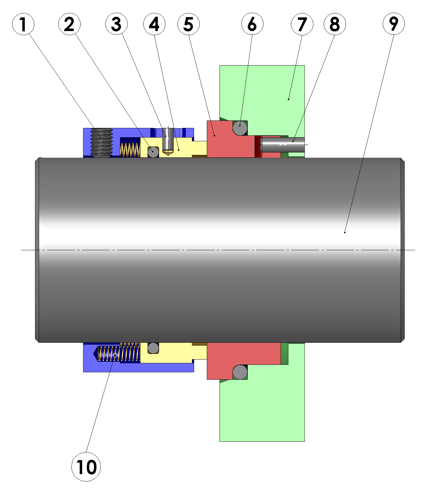 Schnitt durch eine drehrichtungsunabhaengige, einfachwirkende Gleitringdichtung mit Positionsnummern. 1) Gewindestift, Grub Screw, Tornillo prisionero. 2) O-Ring, Oring (Sekundaerdichtung) 3) Spannstift, Rol Pin, Perno de Rodillo, para evitar la rotacion del anillo Deslizante (4) als Verdrehsicherung fuer den Gleitring (4) 4) Gleitring, Sliding Ring, Anillo Deslizante. 5) Gegenring, Anillo del Asiento. 6) O-Ring (Sekundaerdichtung) 7) Gehaeusewand (nur angedeutet), Housing, Carcasa. 8) Spannstift als Verdrehsicherung fuer den Gegenring (5) Perno de rodillo para evitar la rotacion del anillo del asiento (5) 9) Welle/Achse, Shaft, Arbol. 10) Federn, Spring, Muelle